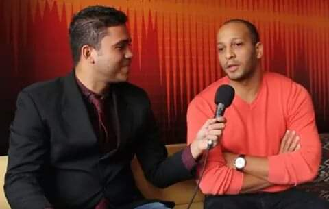 Jomi Santelises sostiene una entrevista a Rene Castillo